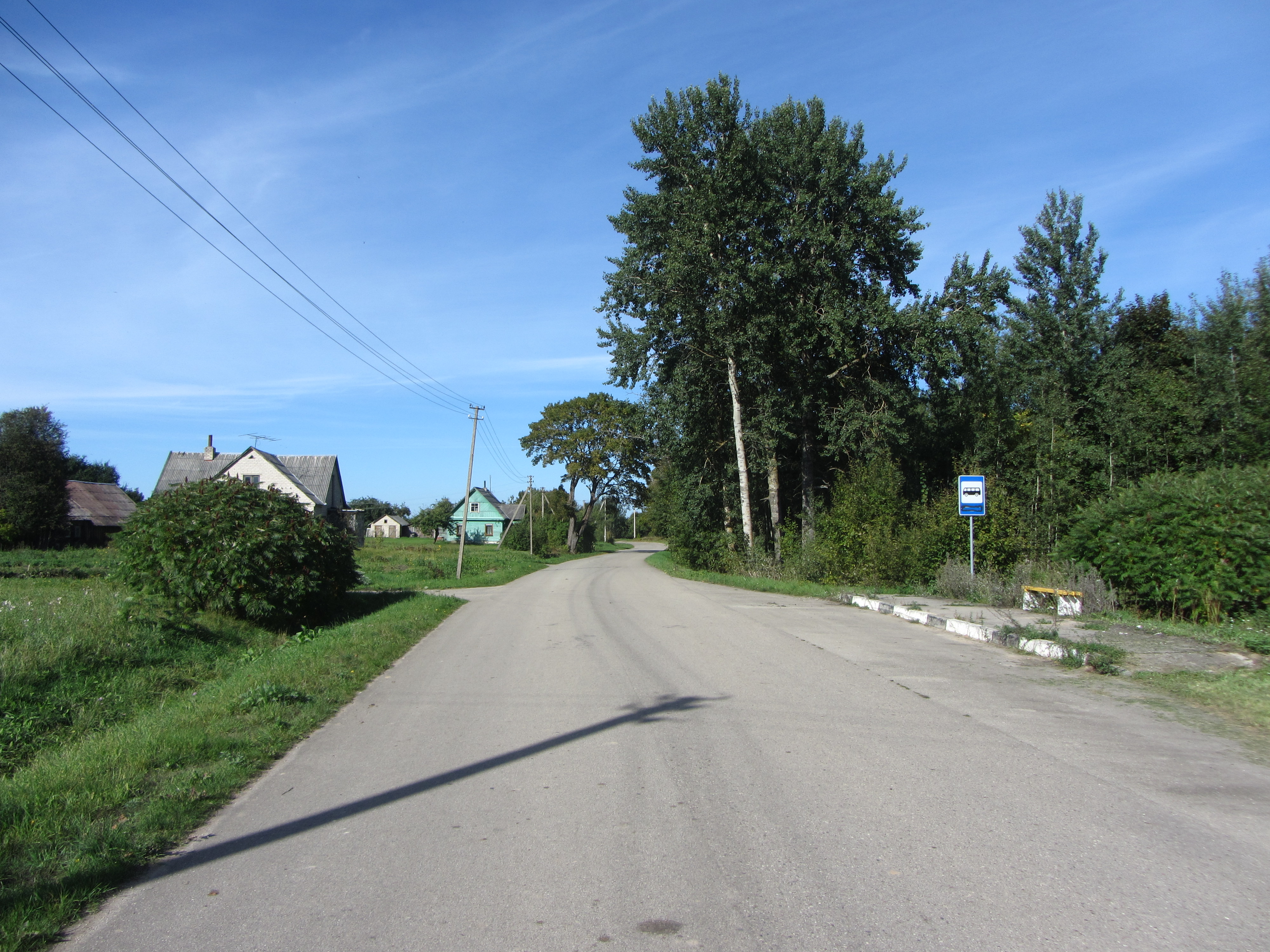 Kaneišiai, Lithuania